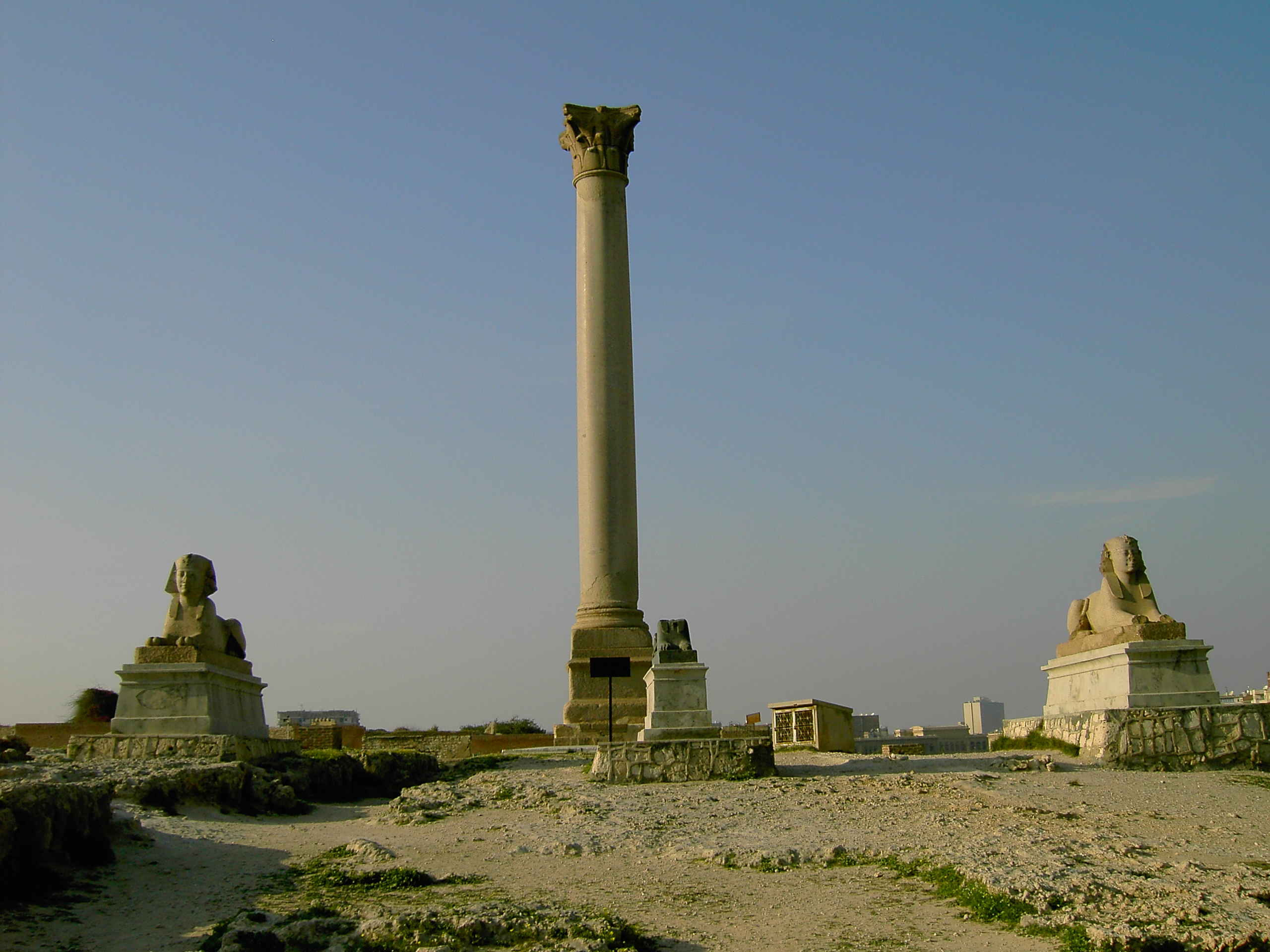 Pompey's Pillar. Photo personnelle d'Alexandrie